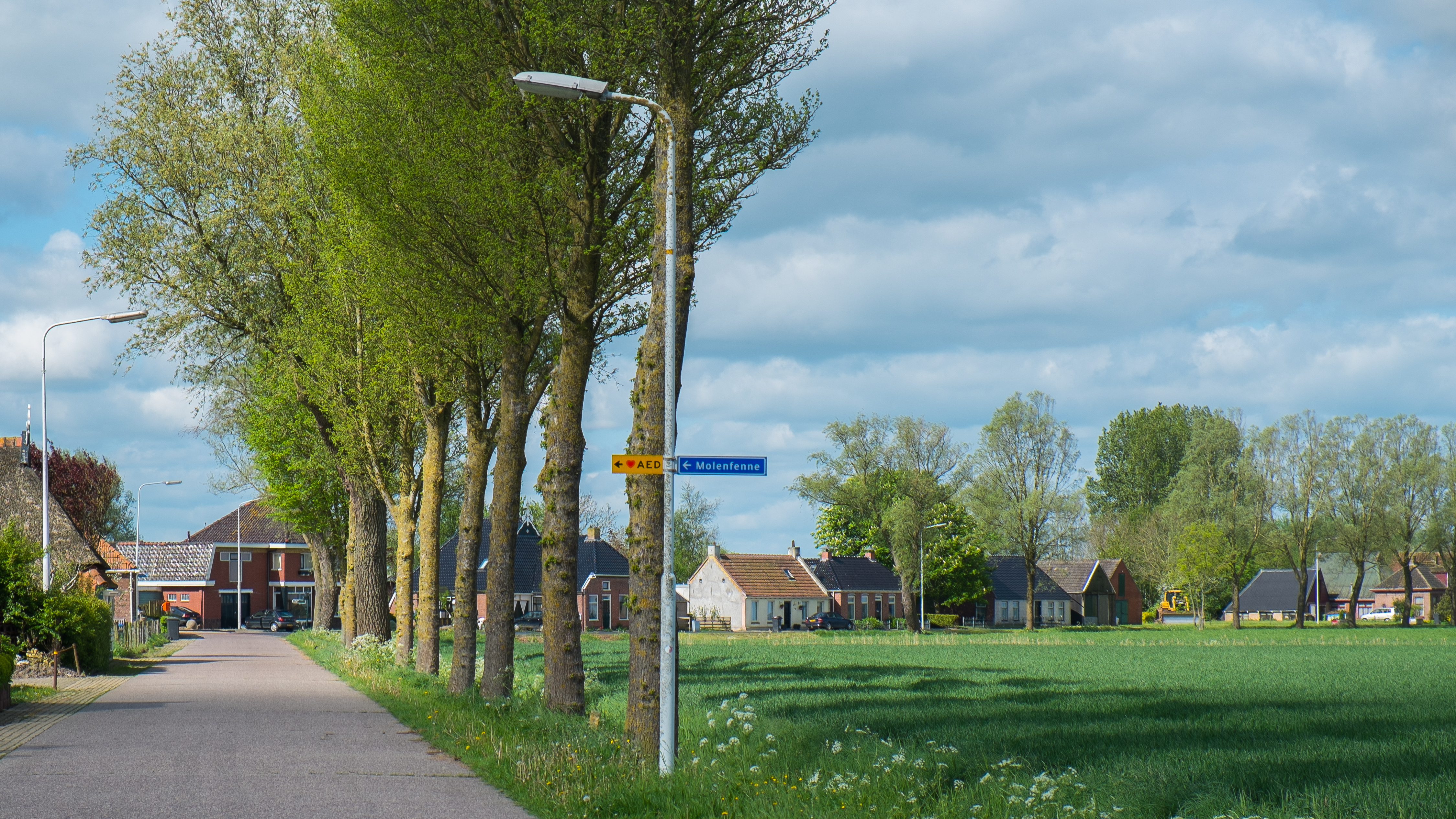 Gruytsweg in Warstermolen